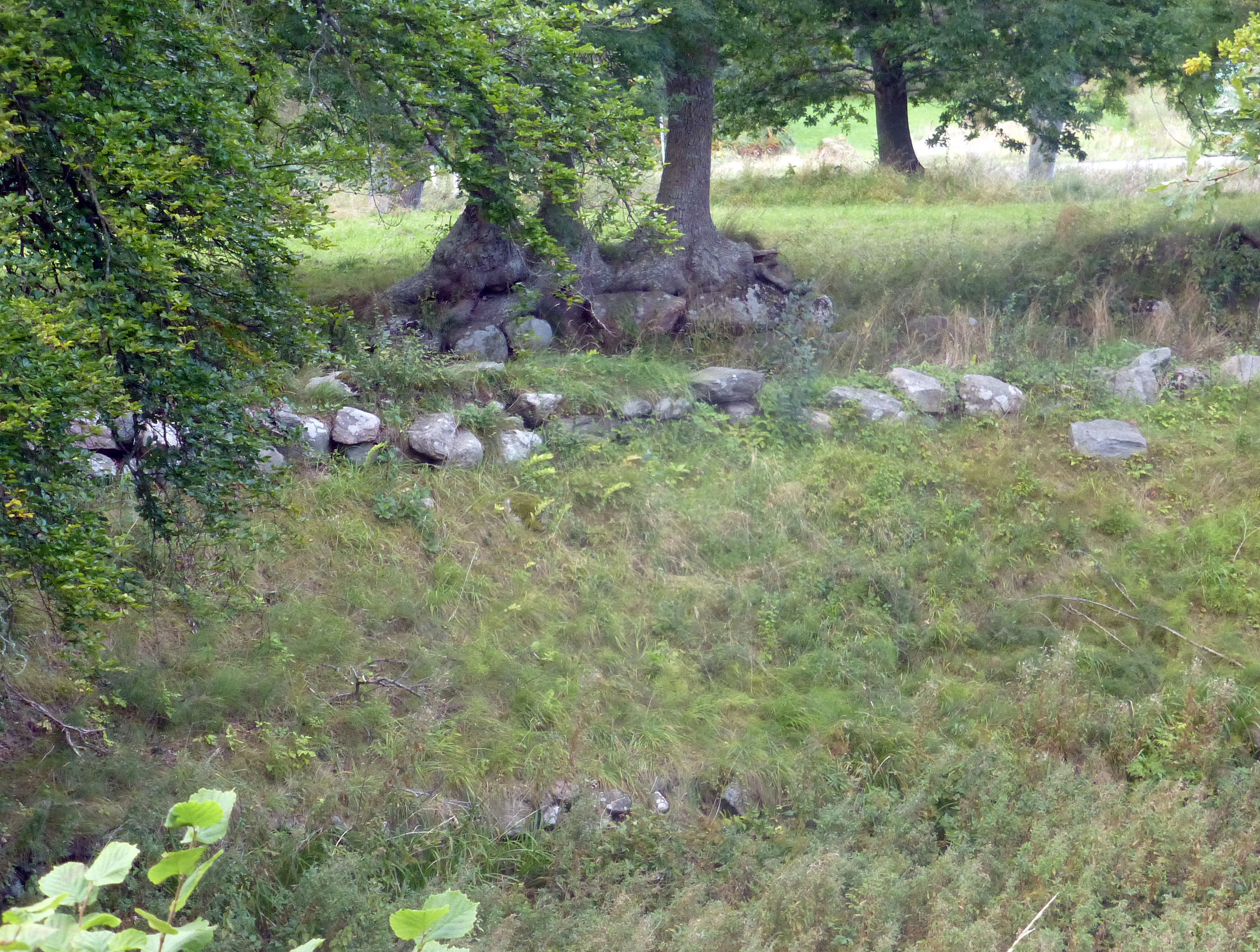 Skovgaarde Voldsted set fra syd: Skovgårde Voldsted er et middelalderligt voldsted på Djursland, beliggende ca. 3 km. vest for Fjellerup og 31 km øst for Randers.